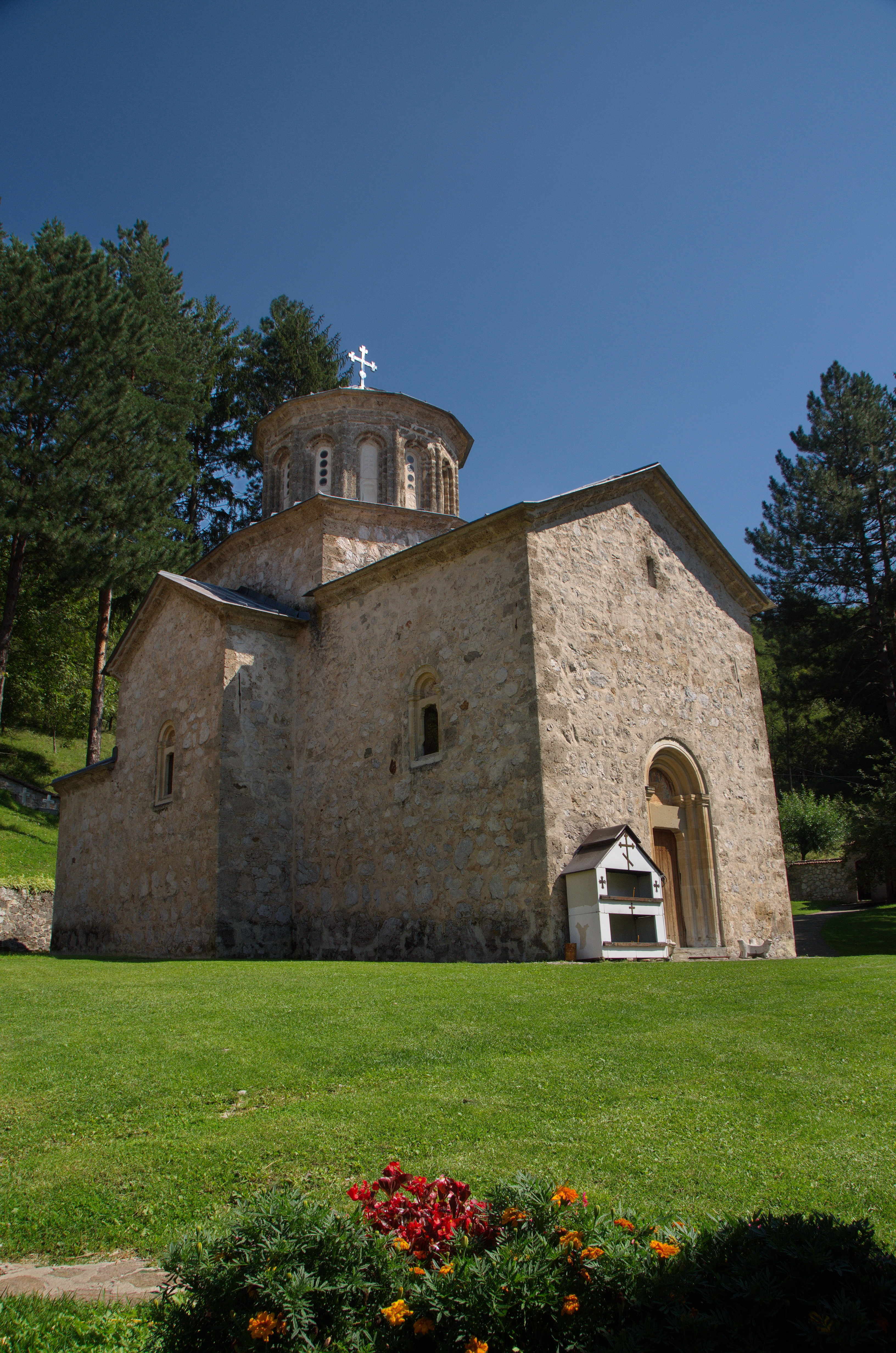 Манастир Свете Тројице (Овчарски) се налази на падинама планине Овчар, у атару села Дучаловићи, на територији општине Лучани. Припада Епархији жичкој Српске православне цркве и представља непокретно културно добро као споменик културе од великог значаја.